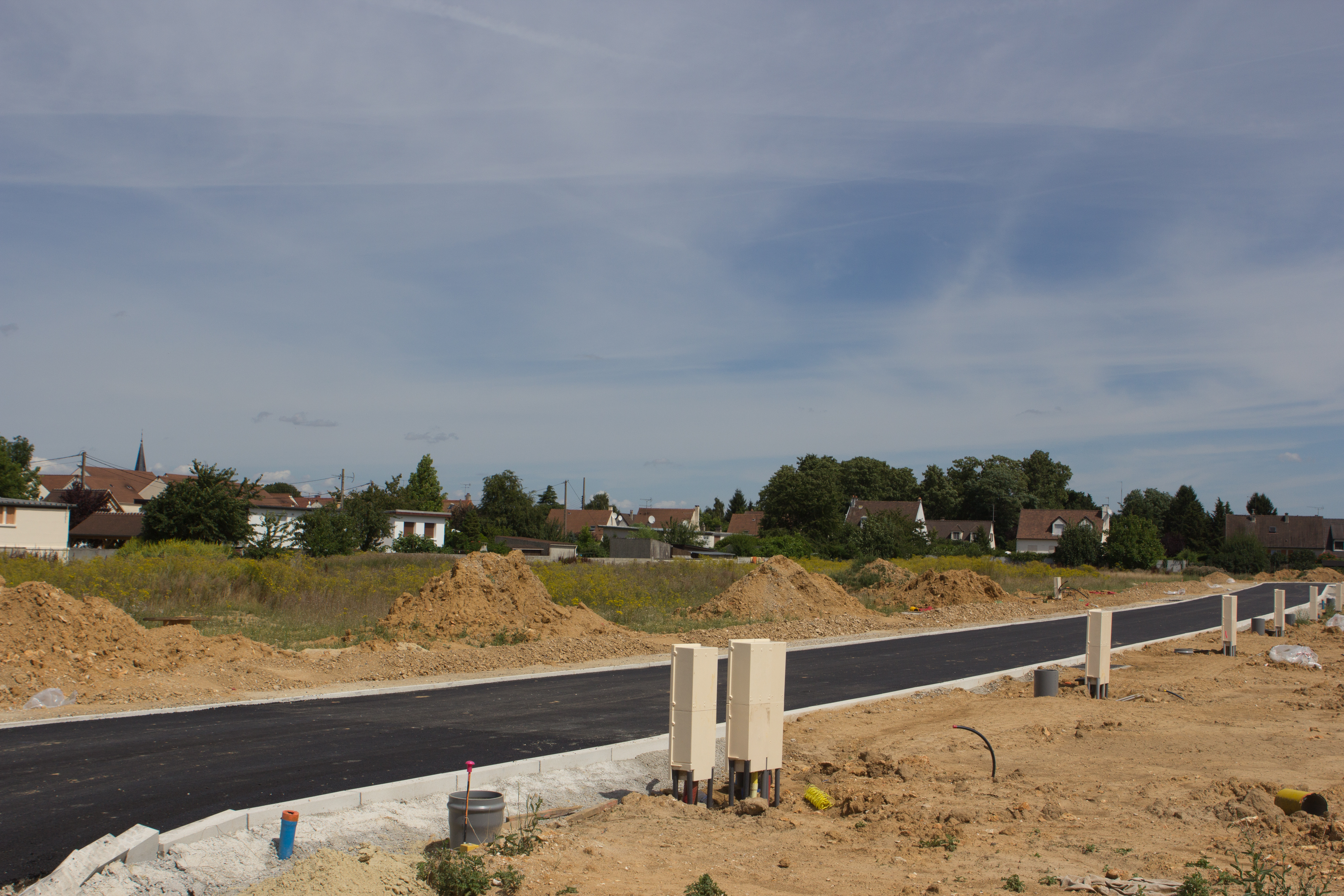 ZAC de la Pièce du jeu / Guignes, Seine-et-Marne, France